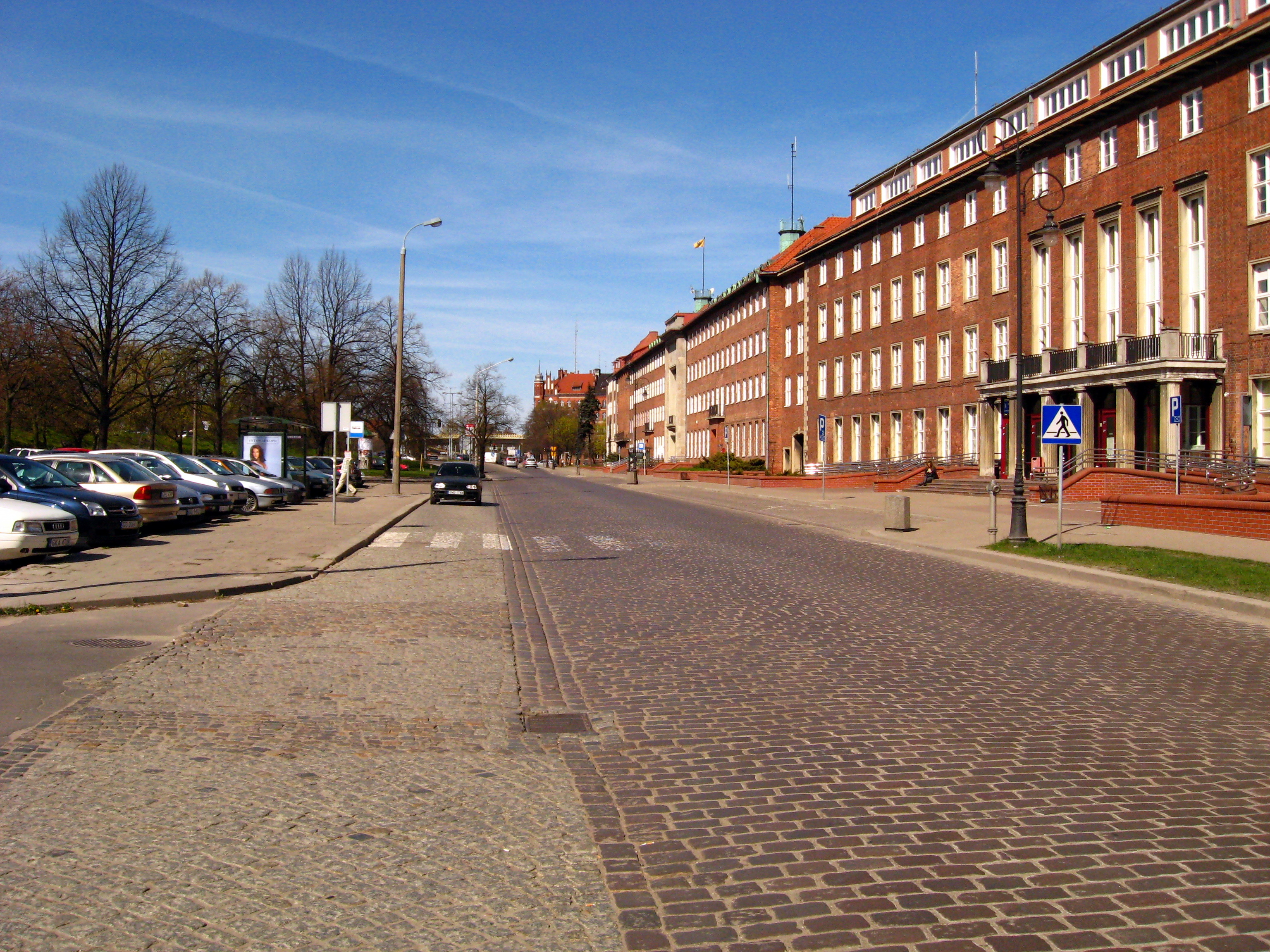 Ulica Okopowa w Gdańsku, siedziba Urzędu Marszałkowskiego Województwa Pomorskiego. Gmach został zbudowany ok. 1935 r. jako "Die Deutsche Arbeitsfront".